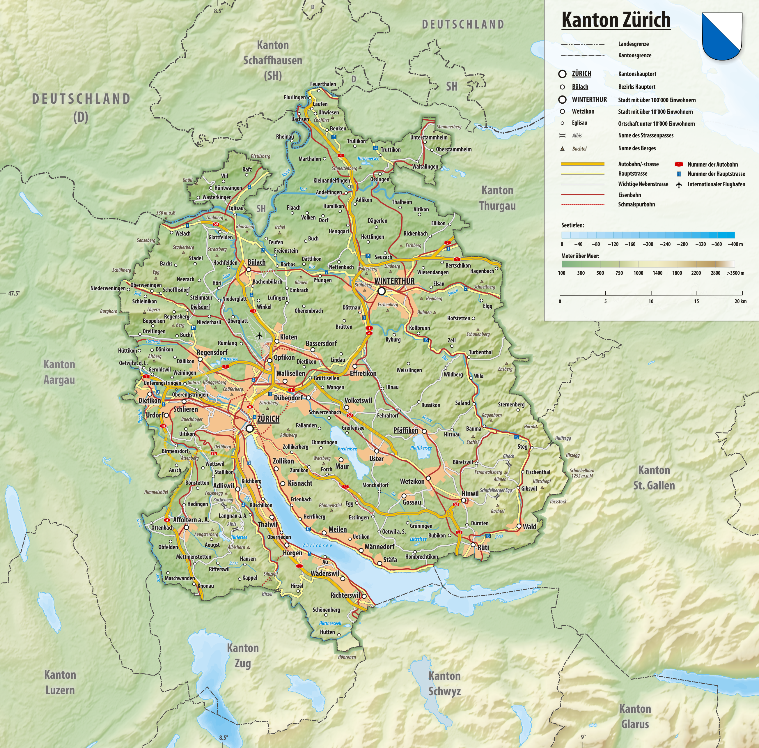 Reliefkarte des Kantons Zürich Topographischer Hintergrund: NASA Shuttle Radar Topography Mission (public domain). SRTM3 v.2.